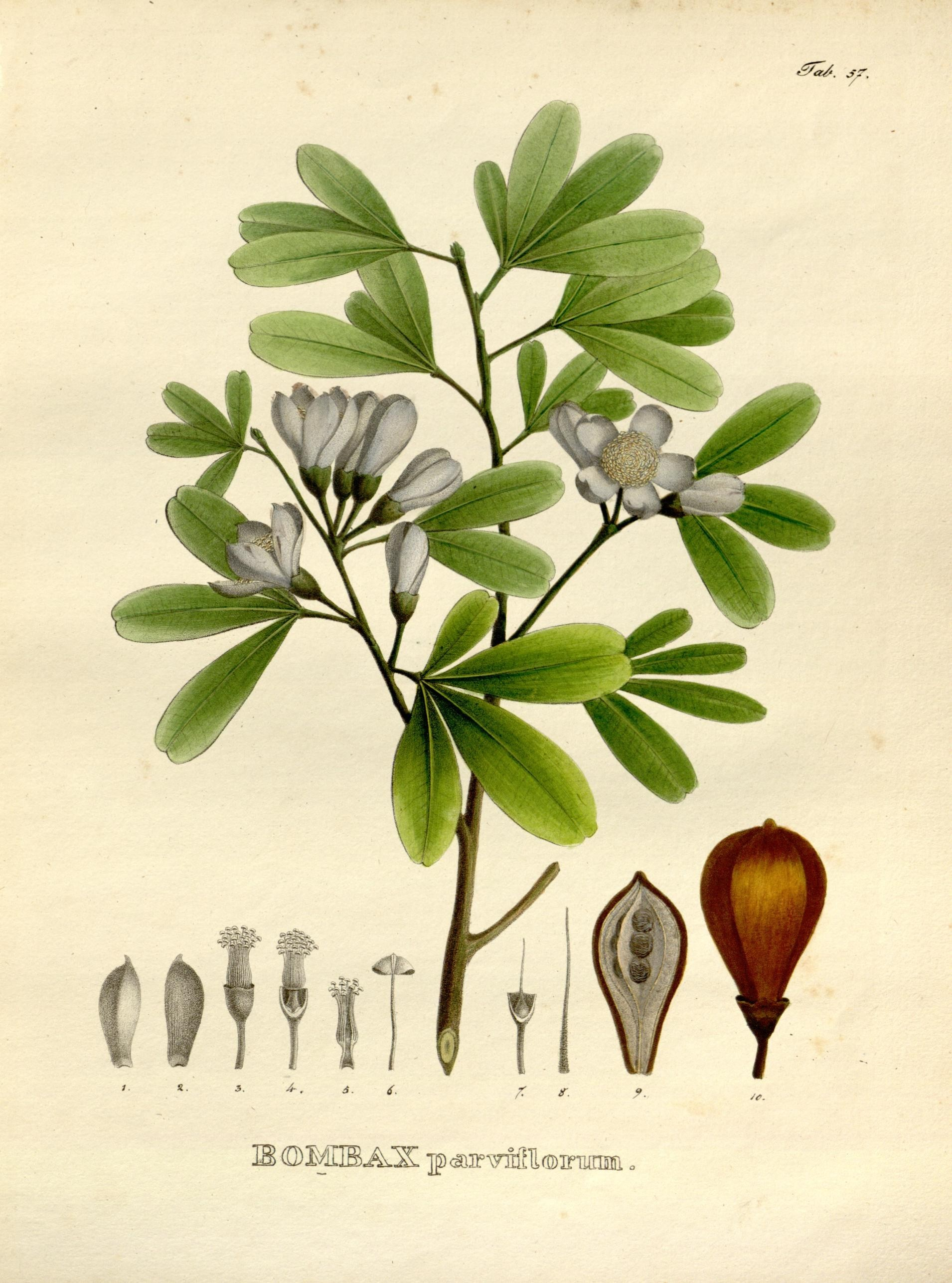 Bombax parviflorum Nova genera et species plantarum. Monachii [Munich] :Impensis Auctoris,1824-1829 [i.e. 1824-32]..